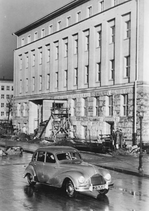 Dresden, Hochschule für Musik Zentralbild Höhne-Pohl 14.11.1952 Hochschule für Musik in Dresden eröffnet. Die Musikakademie in Dresden wurde am 11.11.1952 in einer Feierstunde durch den Vorsitzenden der Staatlichen Kommision für Kunstangelegenheiten Helmut Holtzhauer zur Hochschule für Musik erhoben. Der Direktor der ehemaligen Akadmie, Professor Dr. Karl Laux, wurde zum Direktor der neuen Hochschule ernannt. Nach sowjetischem Muster umfaßt dieses Institut eine Musik-Grundschule für die 14- bis 18-jährigen, ein Konservatorium mit musikpädagogischem Seminar und eine Hochschule für Oper und Operette. UBz: Das Gebäude der Hochschule für Musik in Dresden.